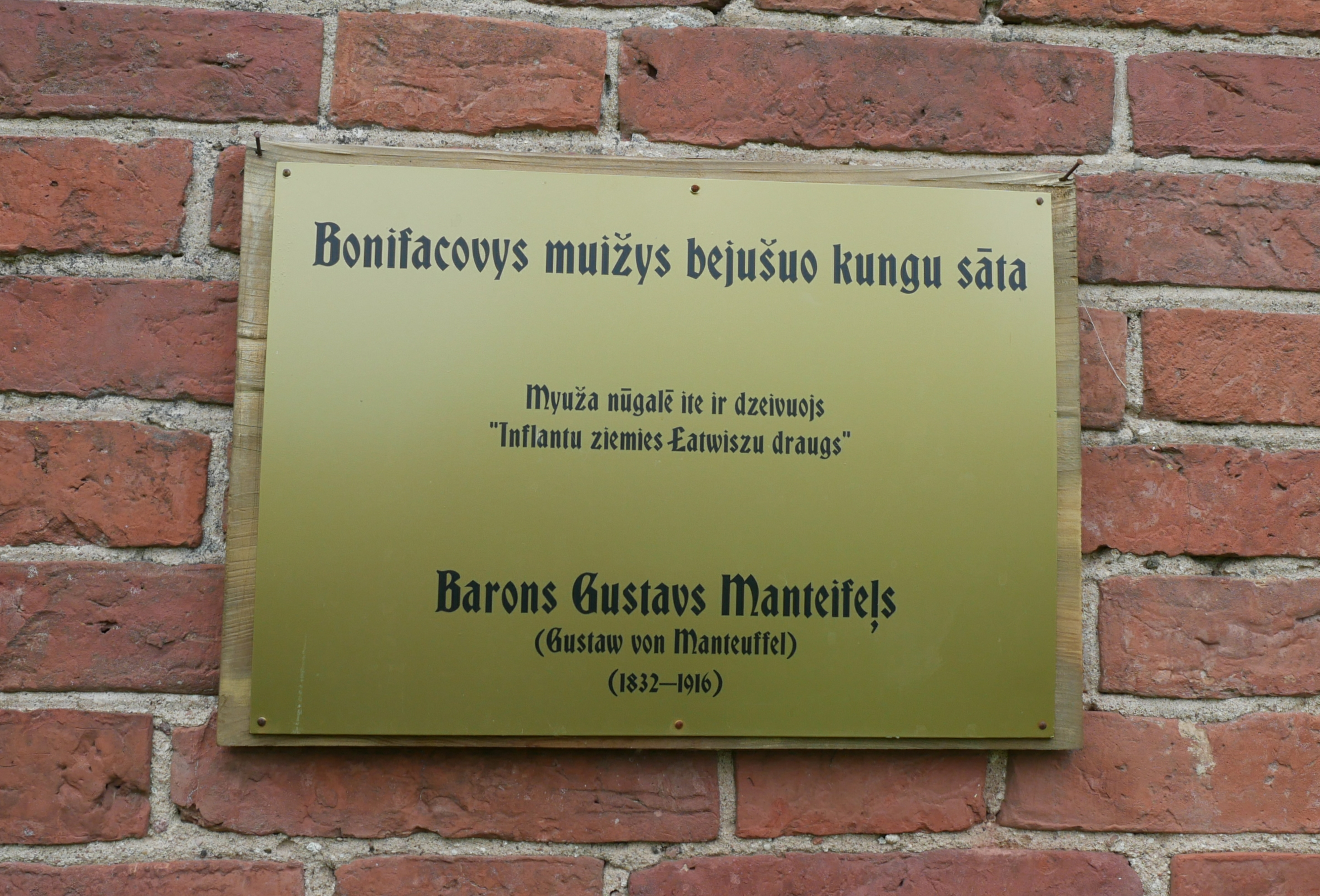 Mälestustahvel Bonifacova mõisas